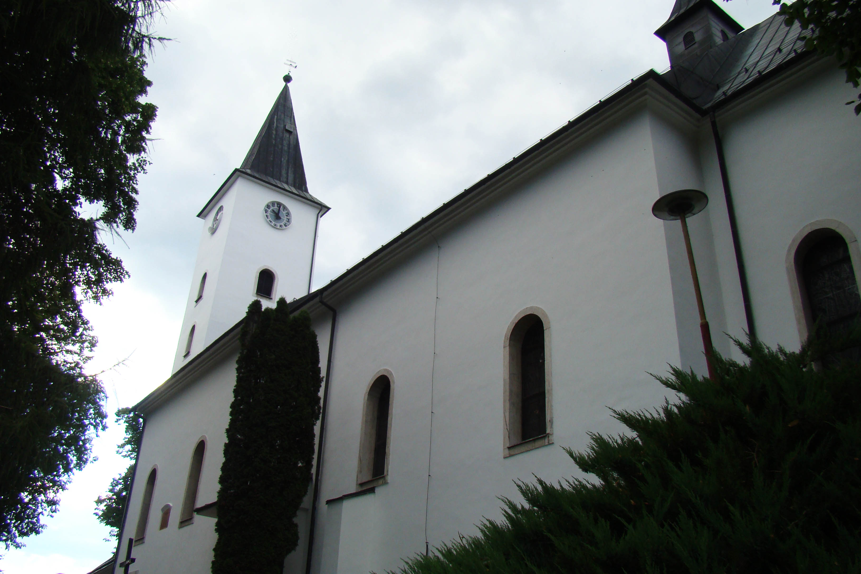 Костел Симона та Юди Наместово Словаччина